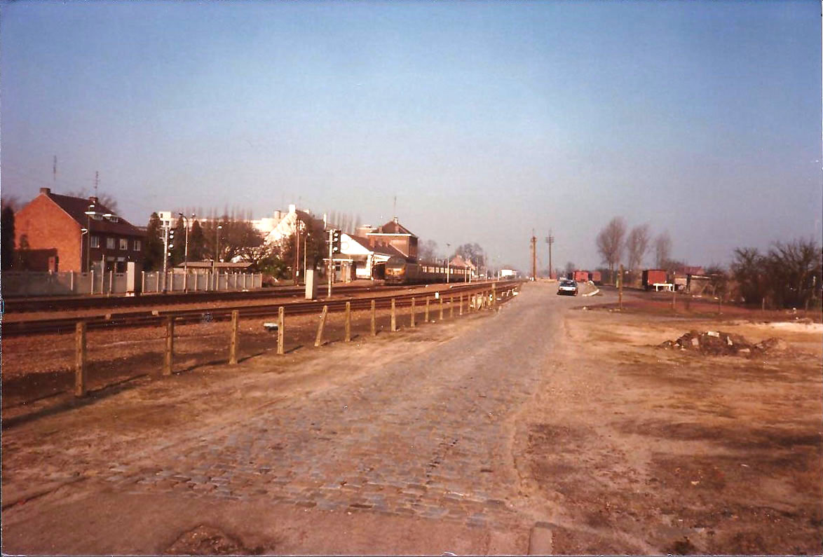 Neerpelt station na de heropening in 1978.